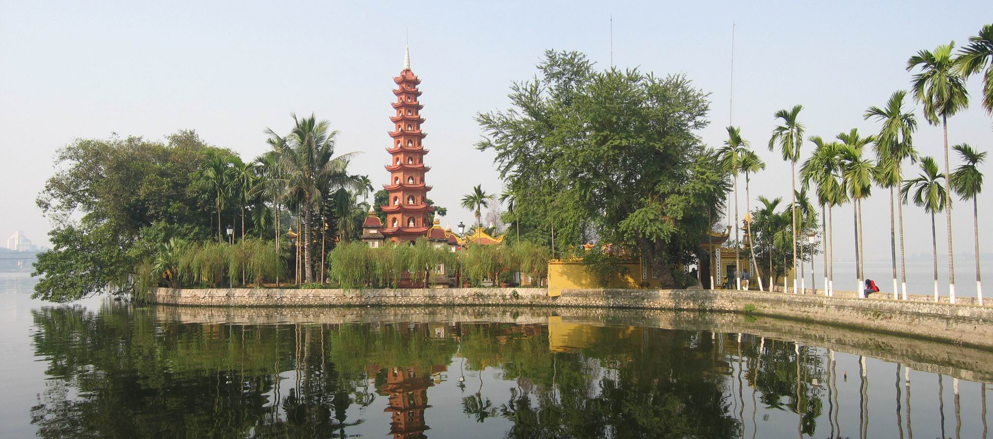 Pagode de la défense du pays sur le lac de l'ouest